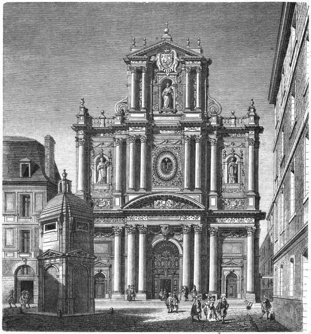 L'église Saint-Paul-Saint-Louis et la fontaine de Birague (reconstitution fantaisiste : les personnages sont en costume du XVIIe siècle, mais la fontaine est celle reconstruite en 1707).